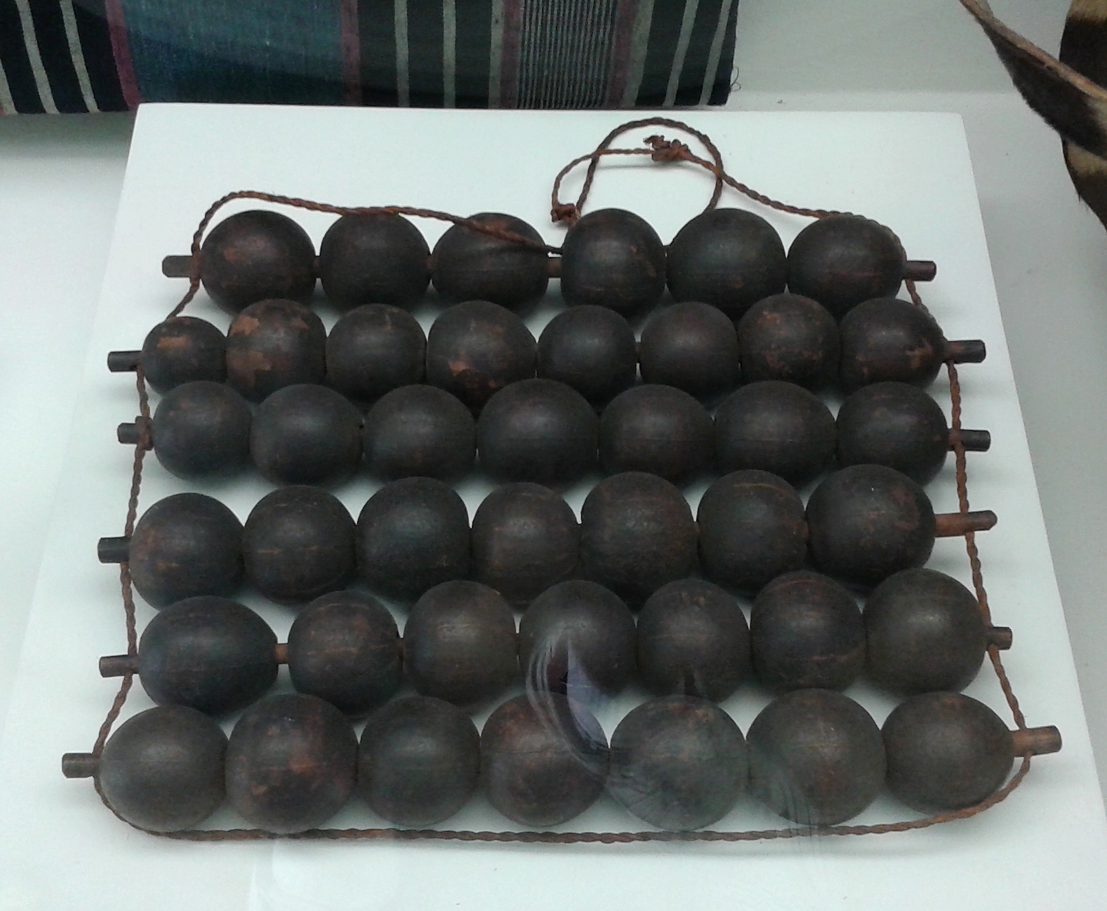 Chocalho - Madagascar. Século XIX. Acervo de etnologia africana e afro-brasileira do Museu Nacional/UFRJ - Rio de Janeiro, Brasil.